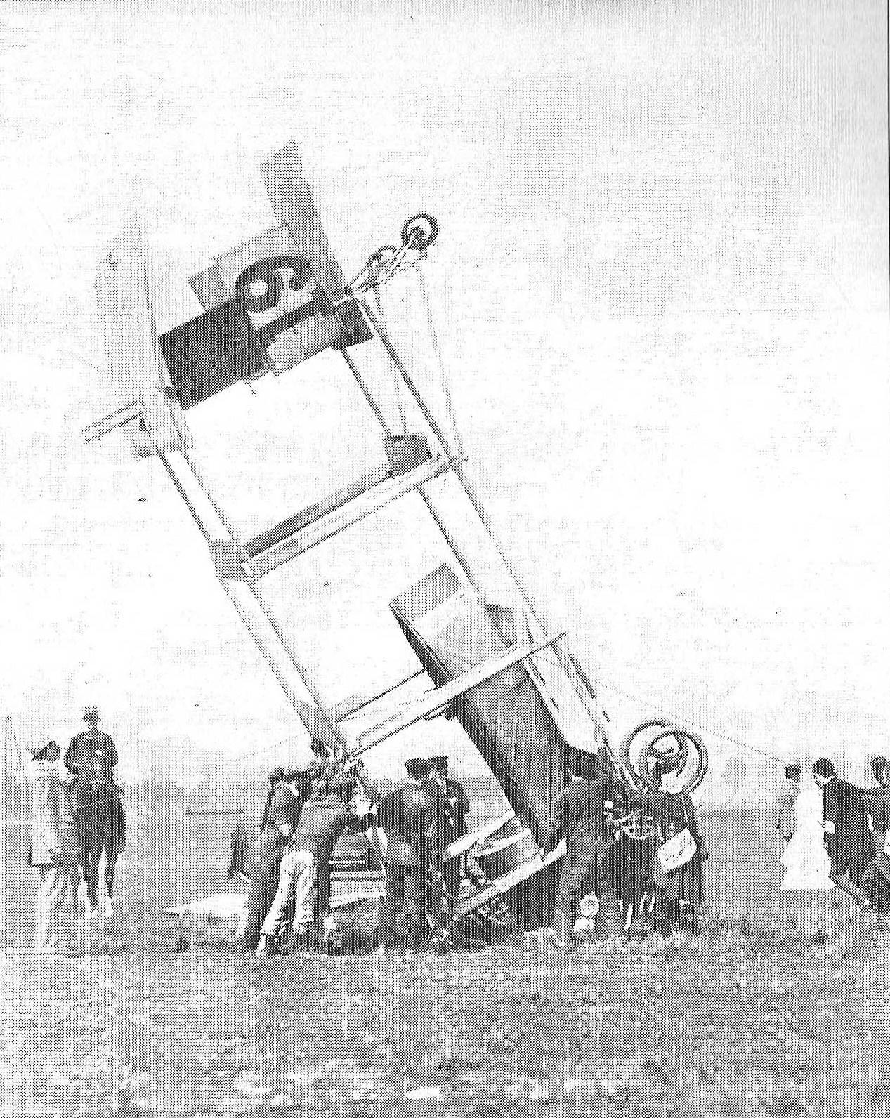 In La_revue_aérienne, un _accident_du_Breguet_19 survenu le_29_août 1909.